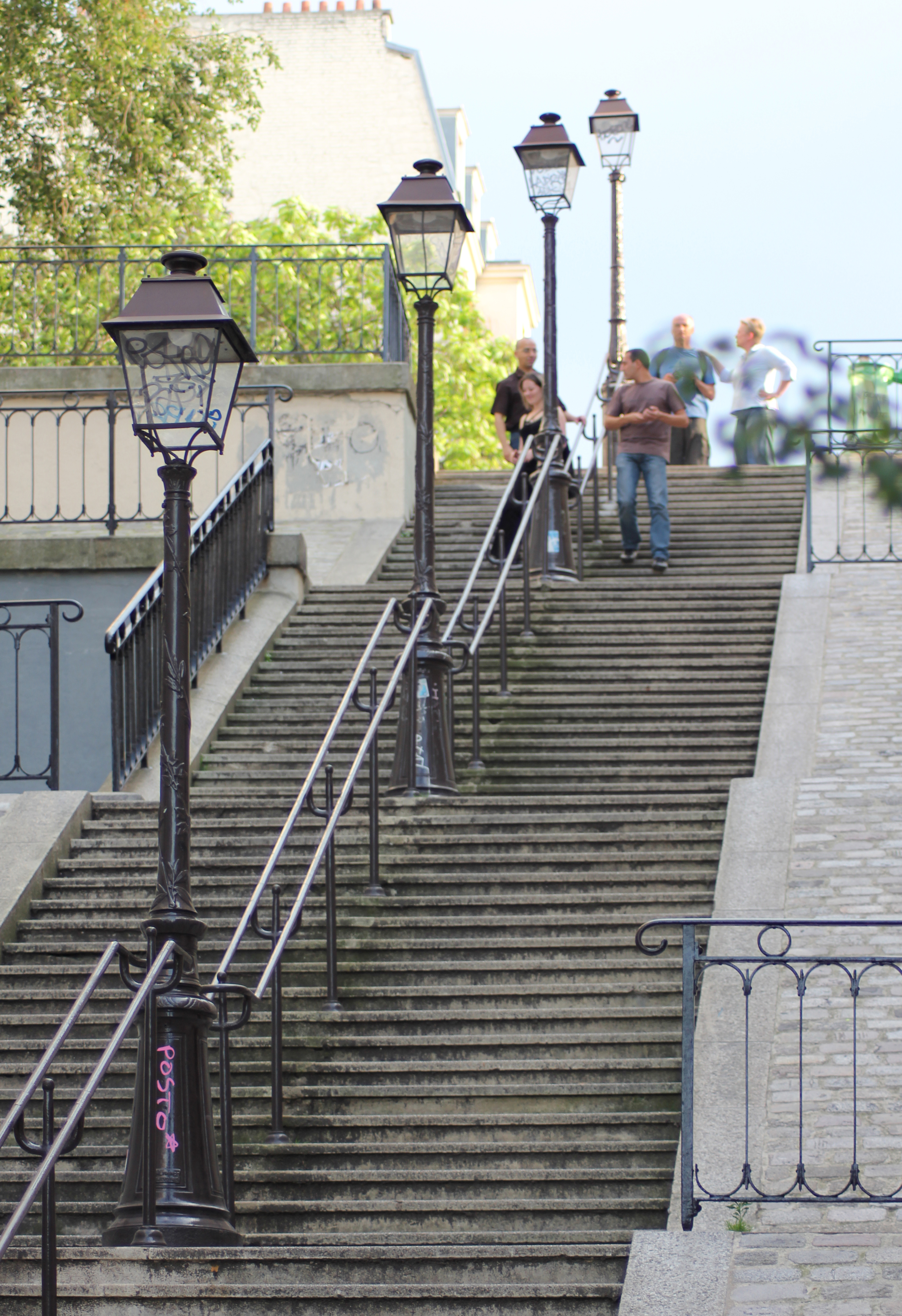 Montmartre, PARIS XVIIIème